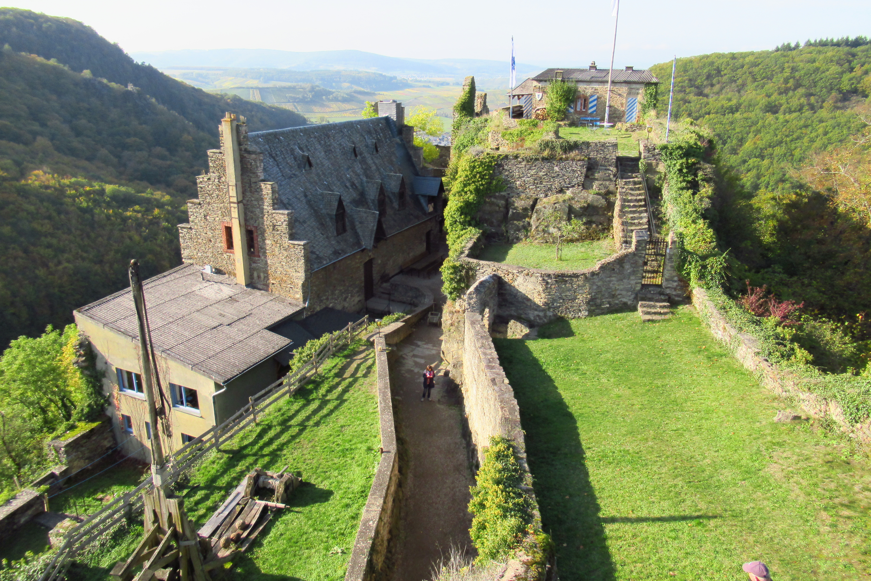 Schloss Veldenz: Aussicht vom Torburgturm auf die Hinterburg.